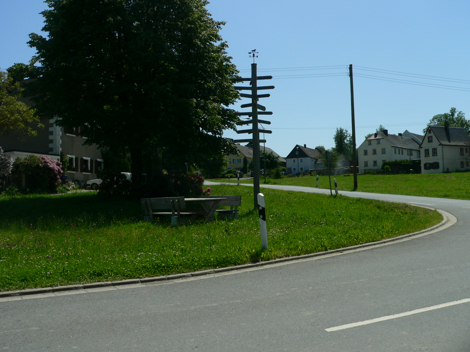 Ansichten der Ortschaft Benk, eingemeindet nach Weißdorf